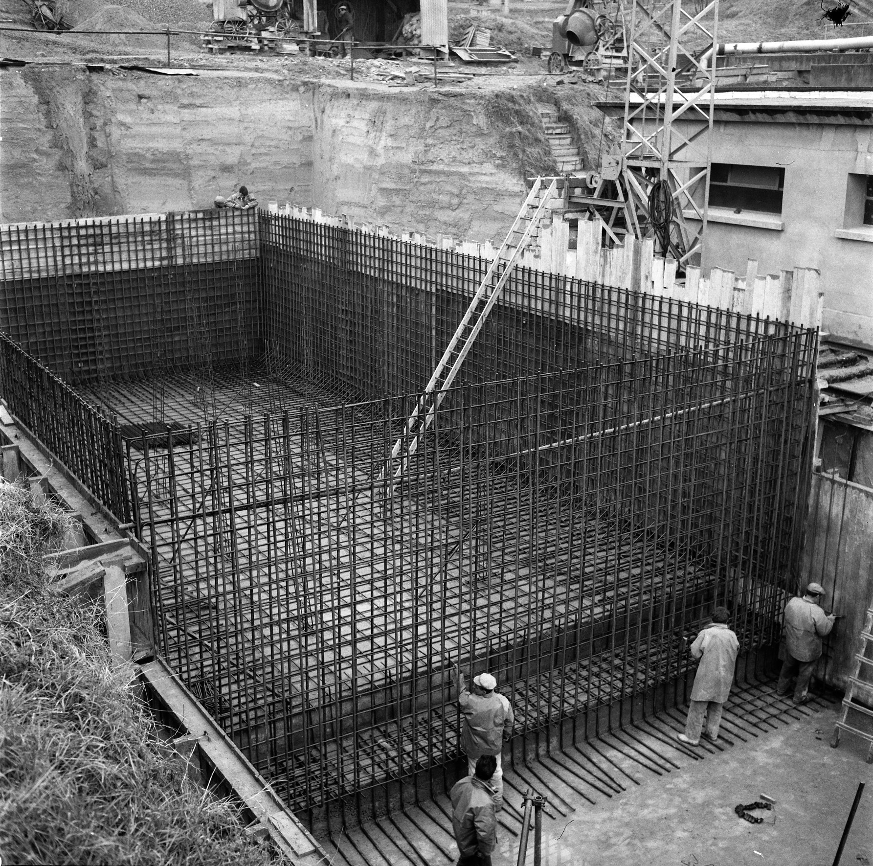 Prairie des Filtres. Le 15 Février 1964. Vue d'un chantier à la Prairie des Filtres.